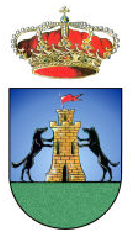 Escudo de Jaraíz de la Vera, en Cáceres (España)